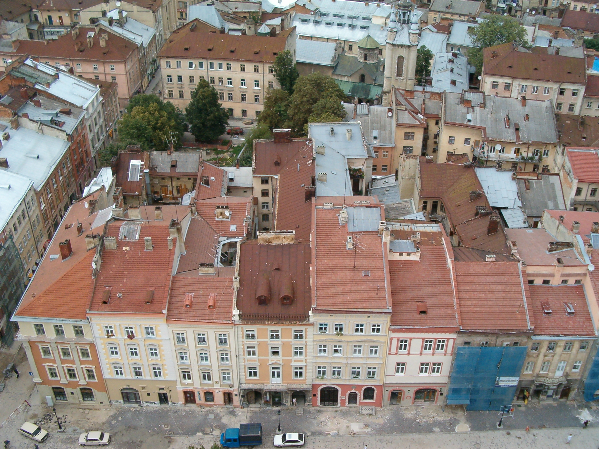 Pierzeja północna Rynku we Lwowie, widok z wieży ratuszowej